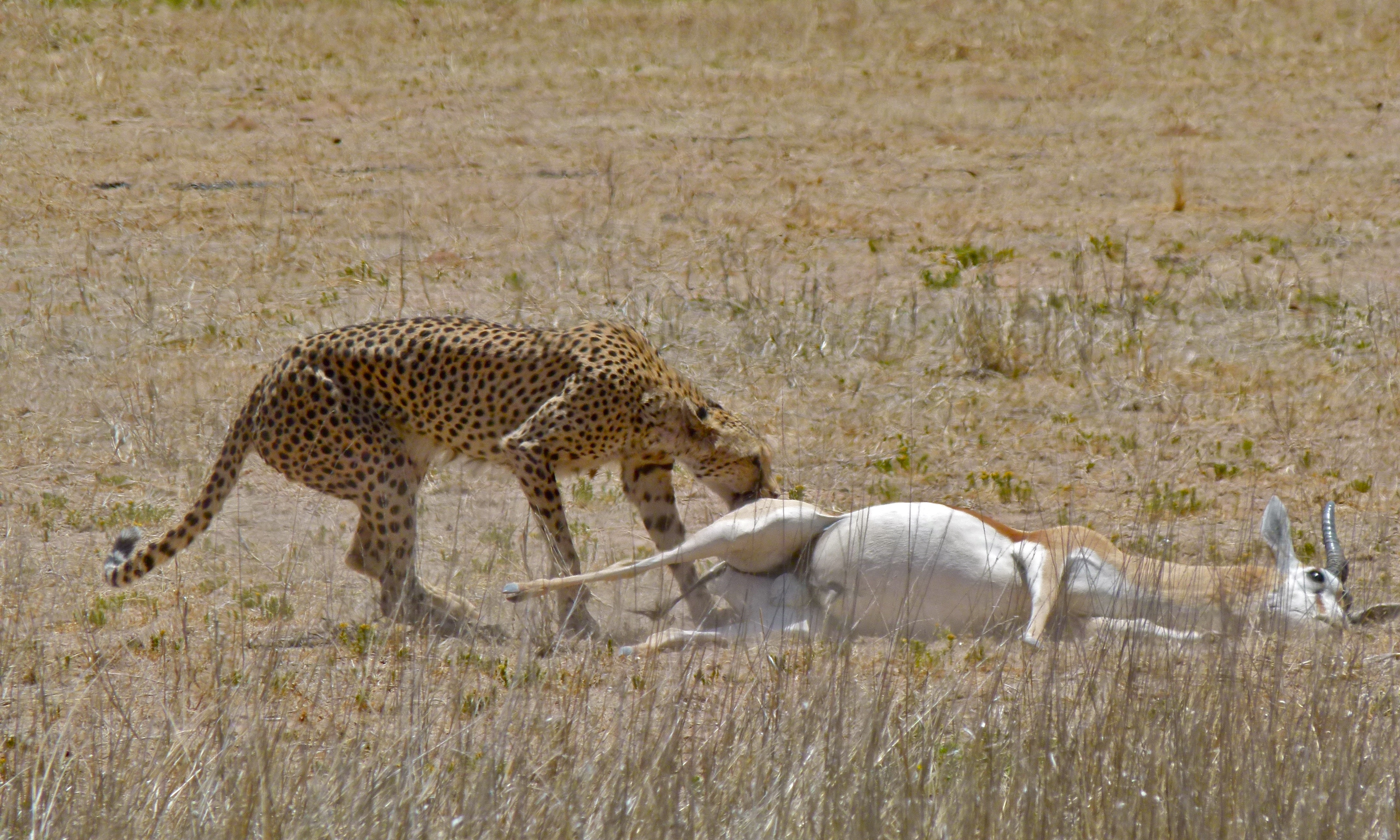 Auob Riverbed, Kgalagadi Transfrontier Park, SOUTH AFRICA